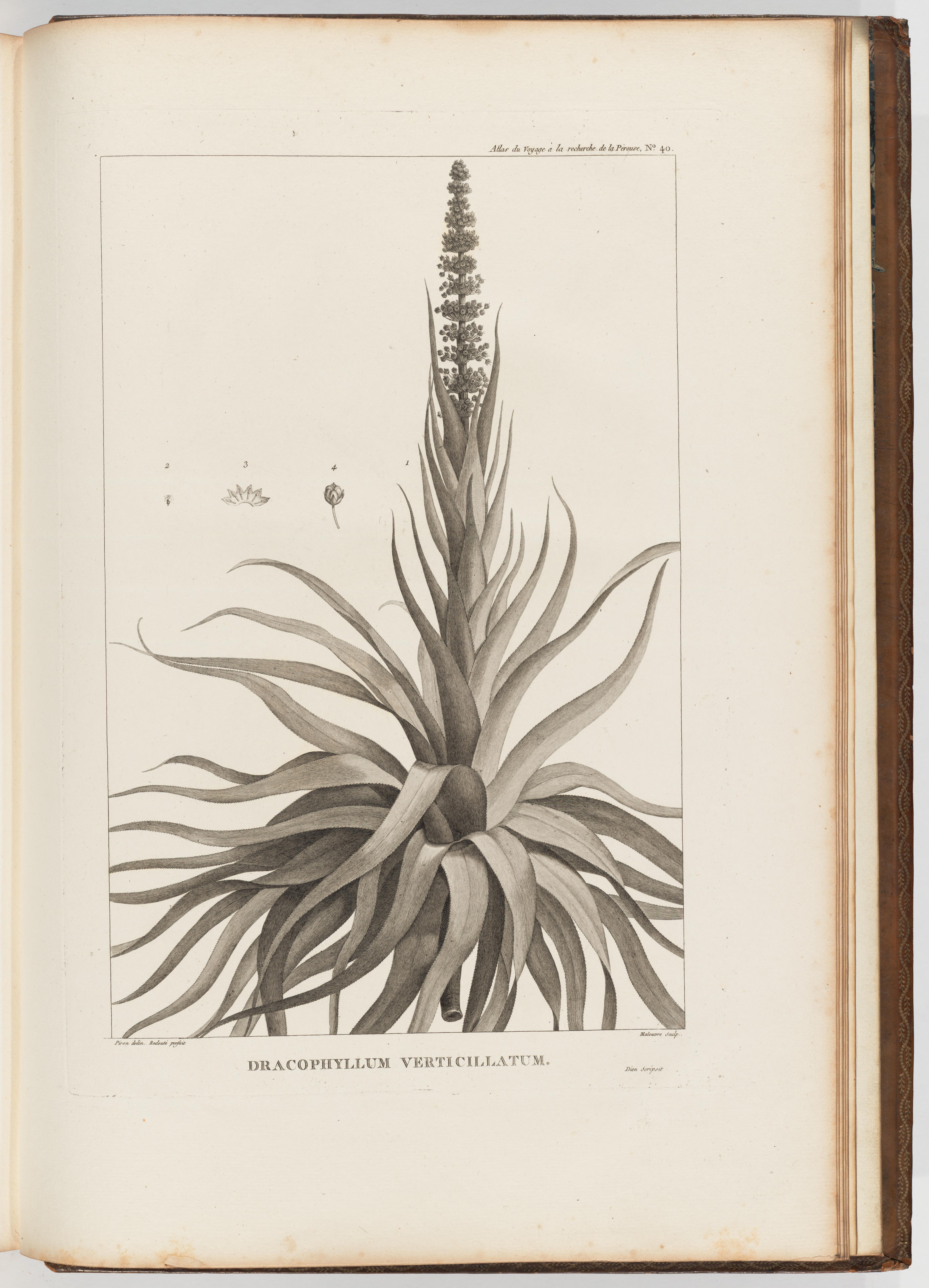 Voyage de La Pérouse autour du monde /publié conformément au décret du 22 avril 1791, et rédigé par L.A. Milet-Mureau.